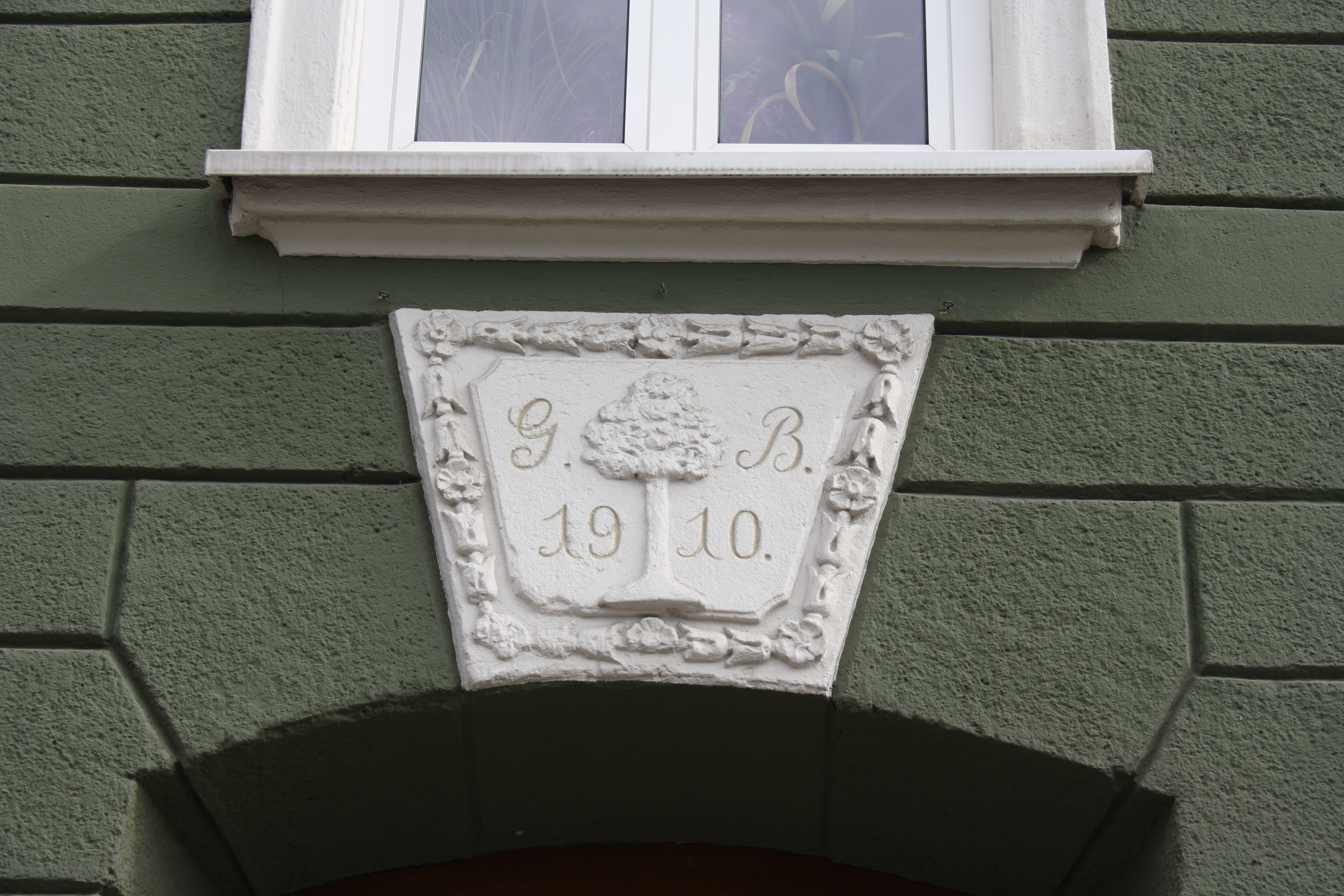 Brauerei-Gasthof Bucher in Gundelfingen an der Donau, Untere Vorstadt 17